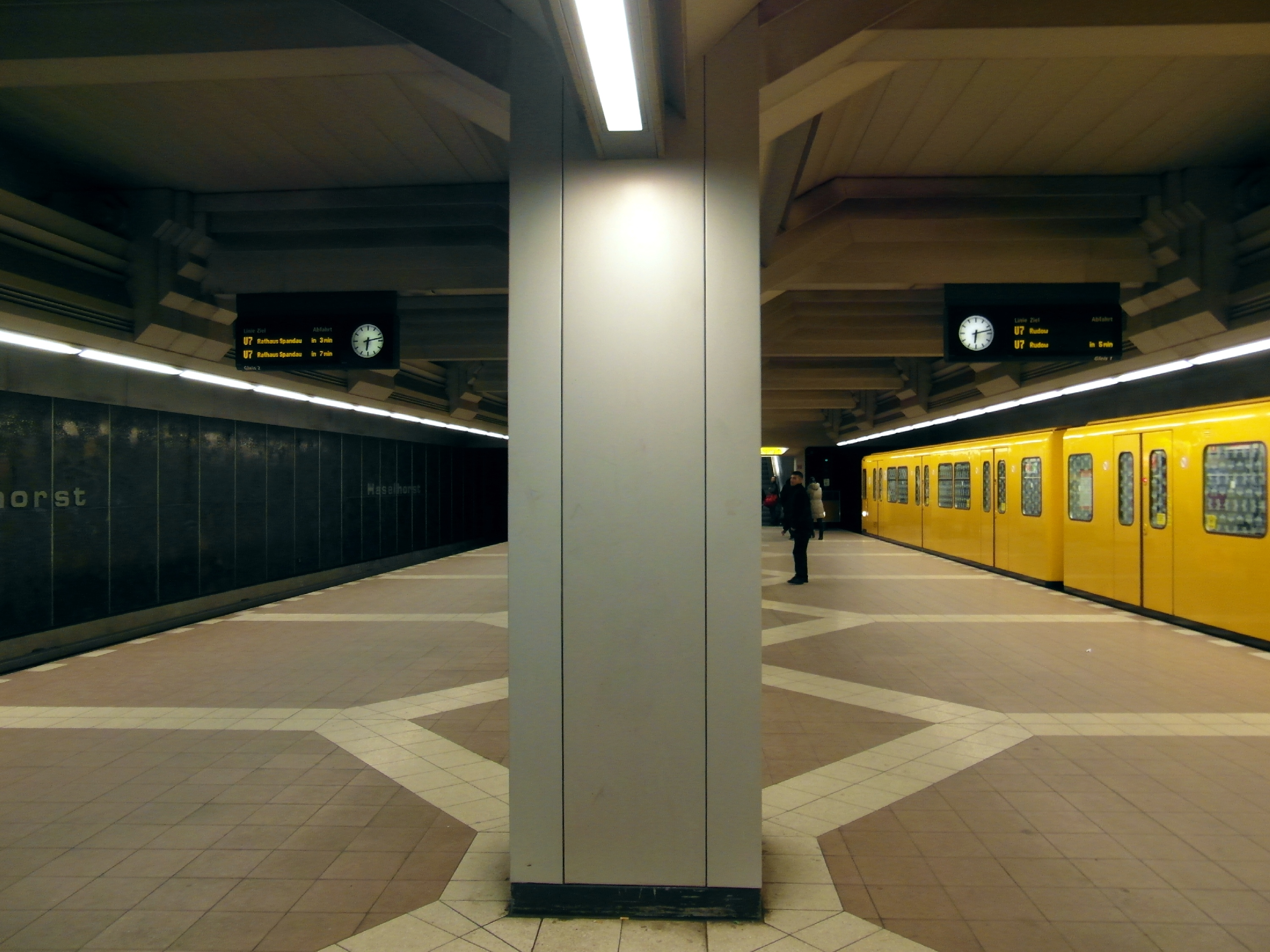 Linie U7